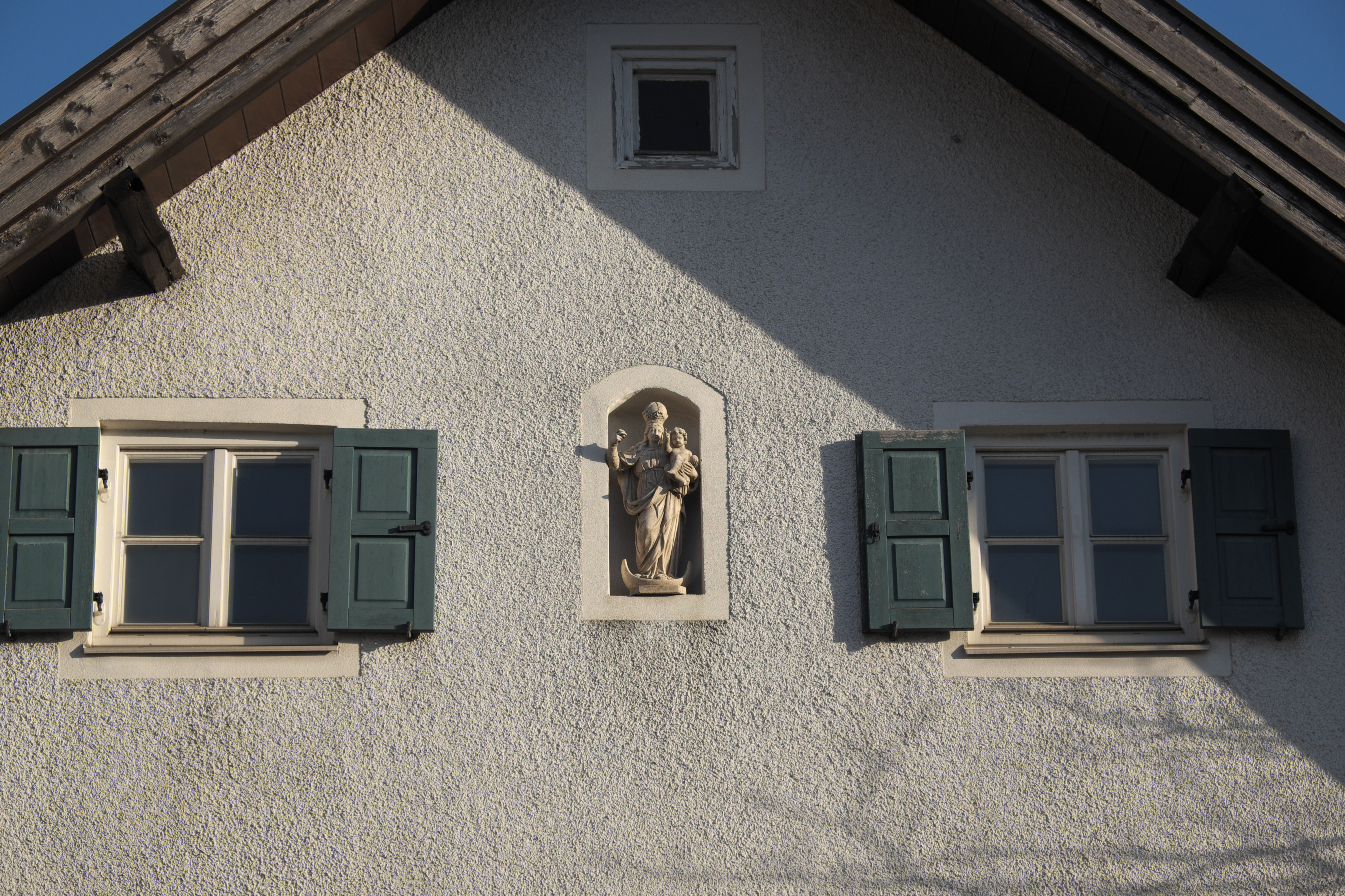 Ehemaliges Bauernhaus in der Planegger Straße 29 im Münchner Stadtteil Pasing (Bayern, Deutschland), Madonna mit Kind an der Fassade